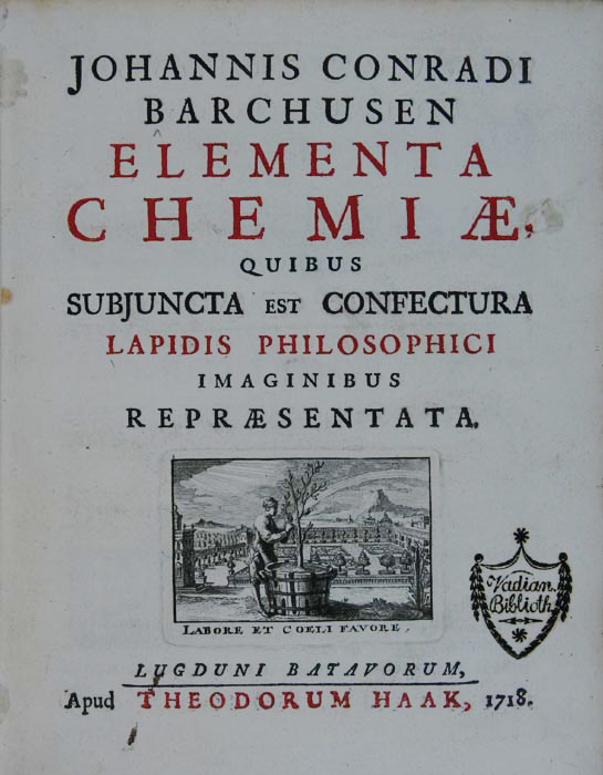 Barchusen, Johann Konrad: ELEMENTA CHEMIAE, quibus subincta est confectura lapidis philosophici imaginibus repraesentata. Ausgabe: Theodorum Haak, Lugduni Batavorum 1718 Vadianische Sammlung Kantonsbibliothek Vadiana St. Gallen, Vad.Slg. Kb75